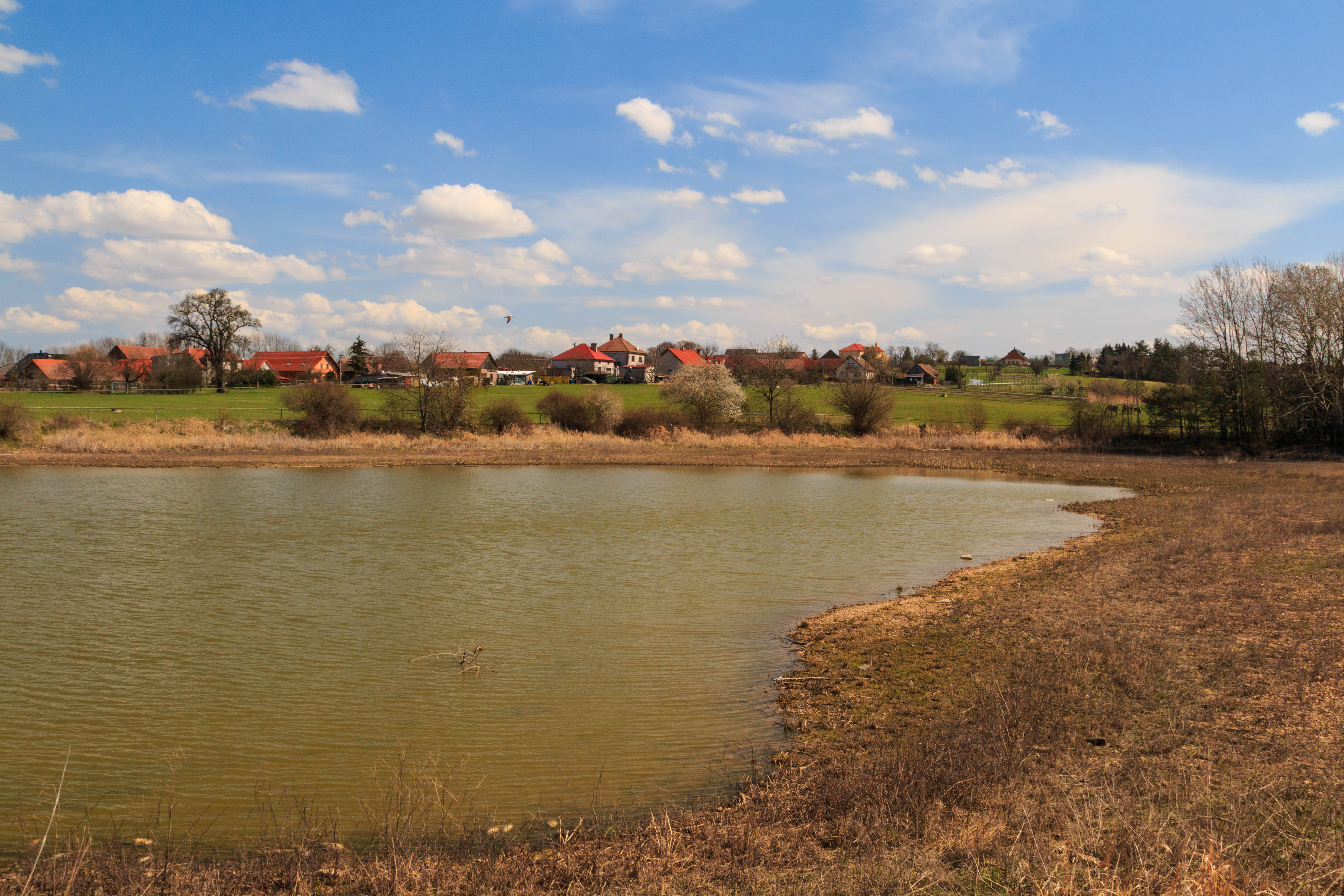 Dolejší rybník u Měníku Project: Vodstvo.